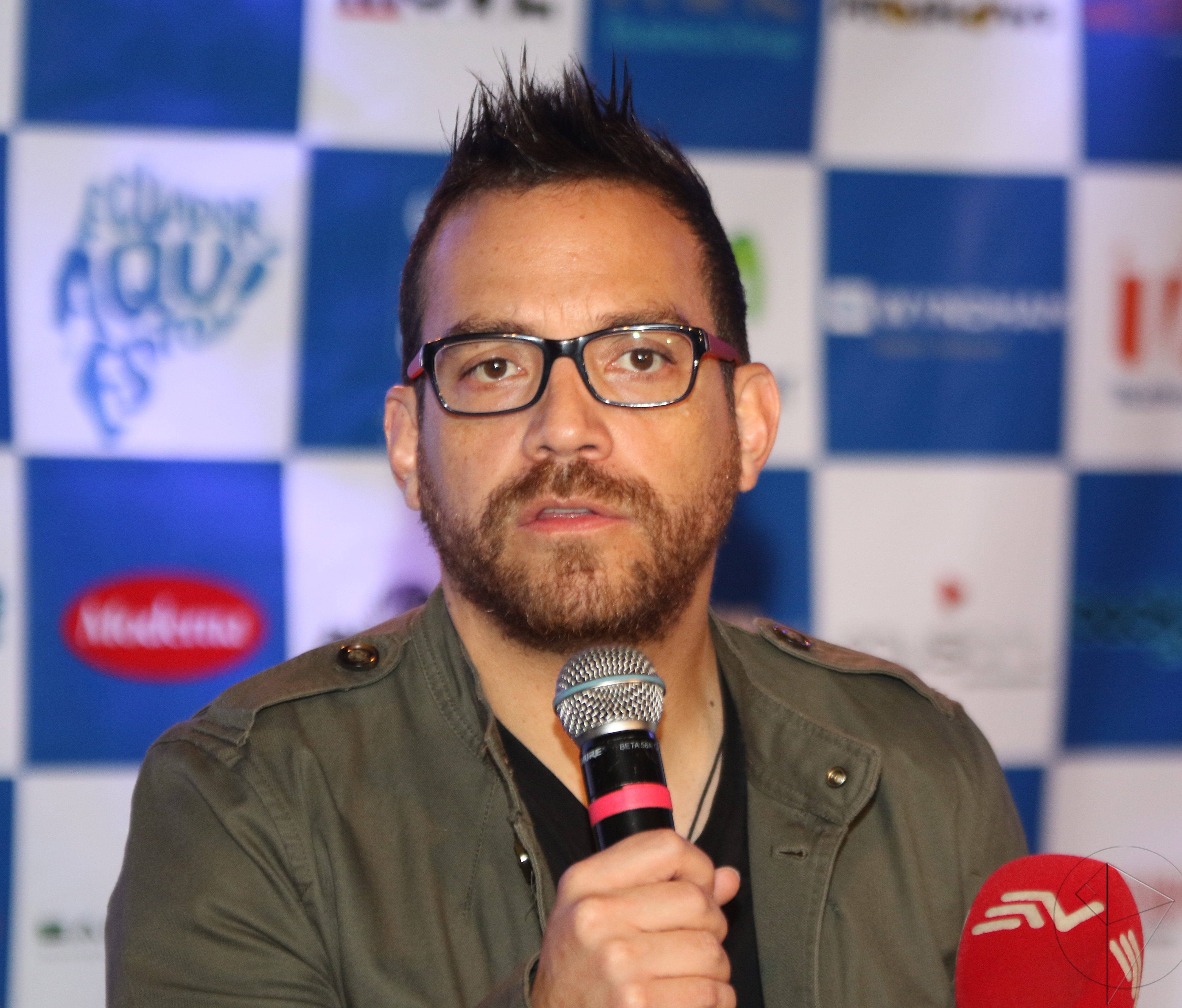 Juan Fernando Velasco en 2017.